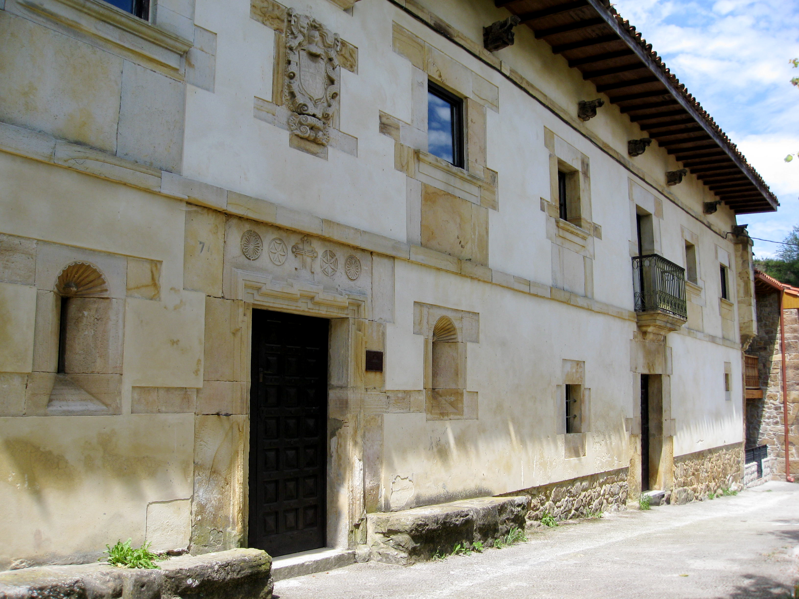 Palacio del Mayorazgo en la localidad de Iguanzo. Concejo de Cabrales, Asturias.